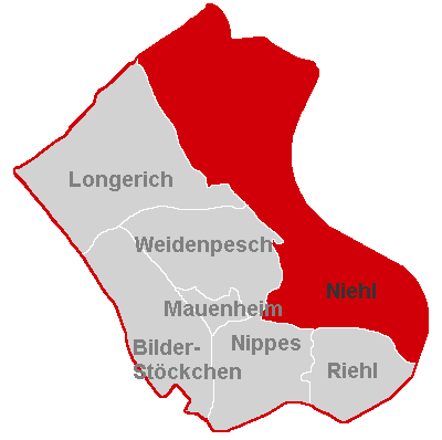 Lagekarte Niehl im Stadtbezirk Köln-Nippes